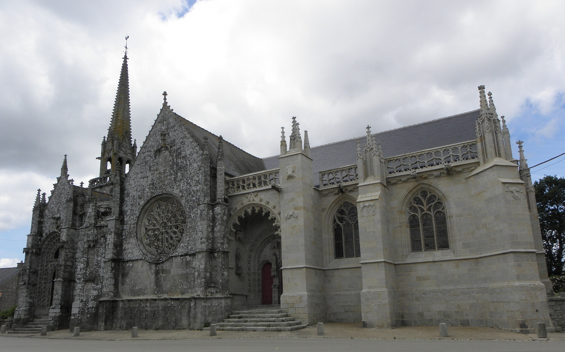 Flanc sud de la chapelle Notre-Dame de Kernascléden (56). .